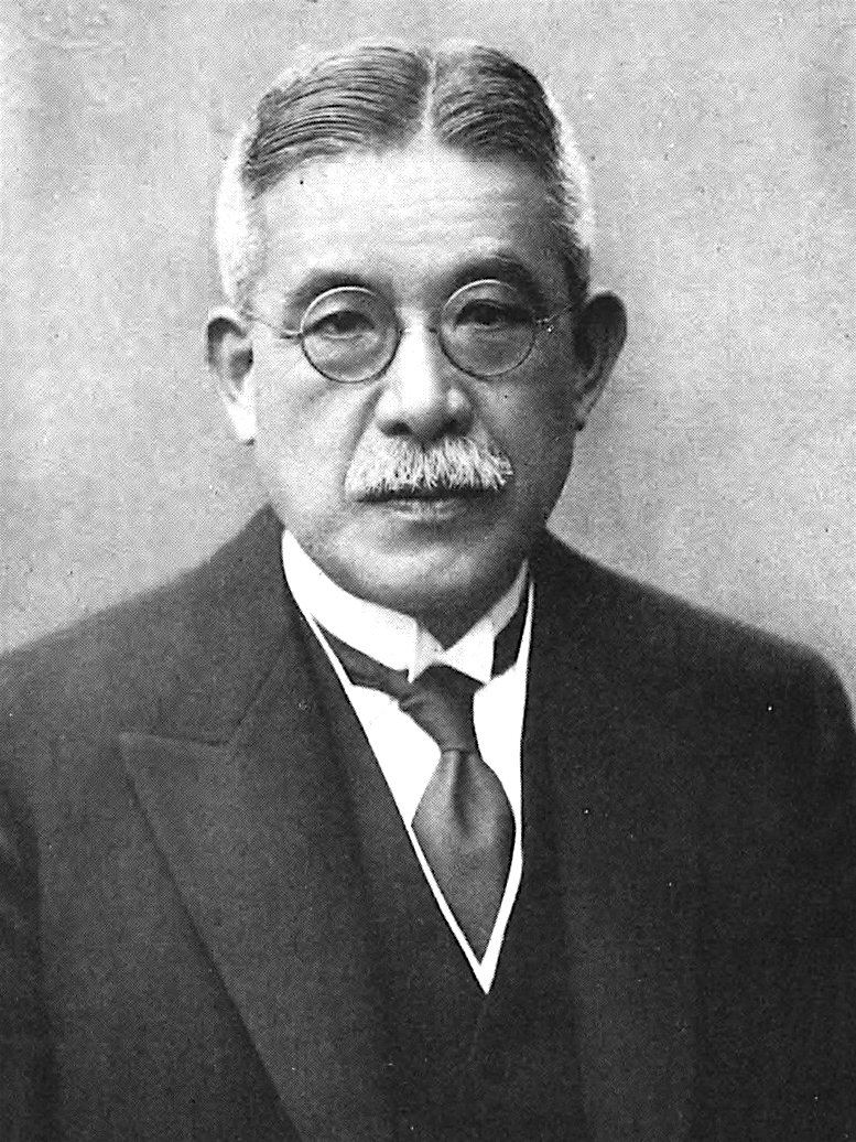 Portrait of Tokonami Takejiro (床次竹二郎, 1867 – 1935)